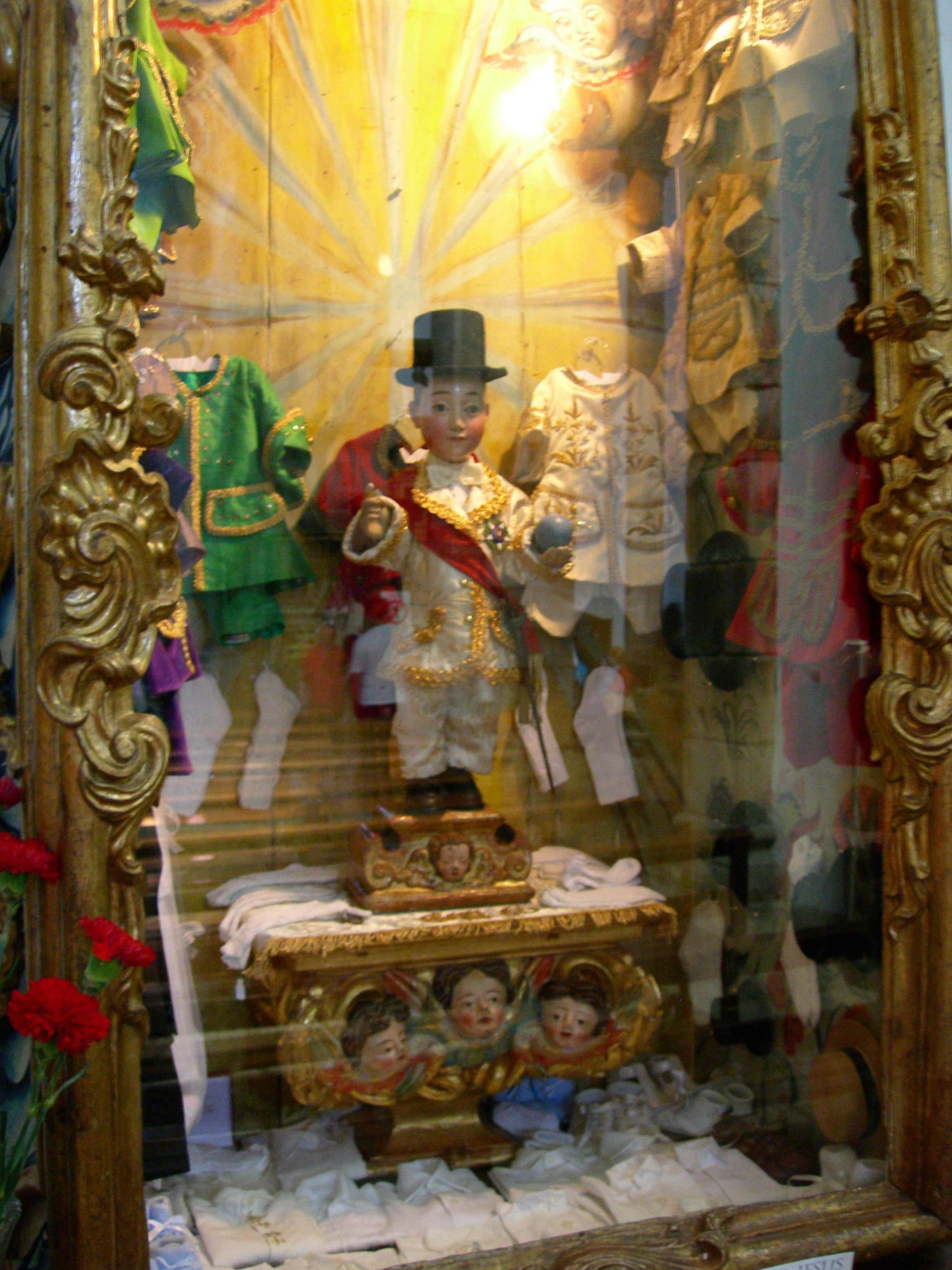 O Menino Jesus da Cartolina This monument is classified as Monumento Nacional. This file was uploaded for Wiki Loves Monuments in Portugal with the unique identifier 70282.